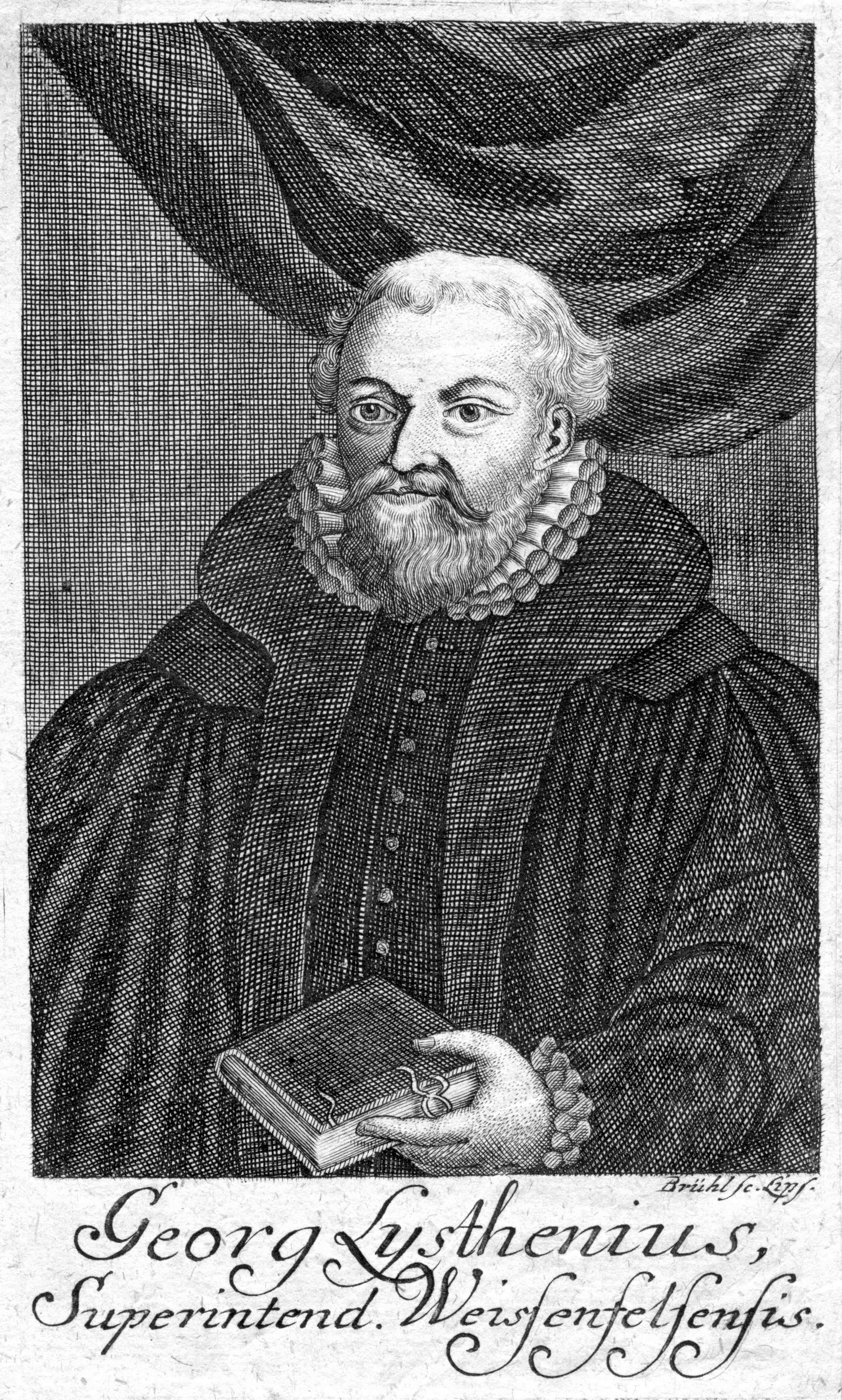 Georg Lysthenius, kurfürstlich sächsischen Hofprediger und Superintendent in Liebenwerda und Weißenfels